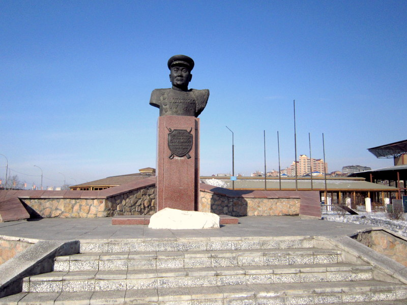 Бюст генерал-майора И.В. Балдынова в сквере Дворца детского и юношеского творчества в Улан-Удэ.